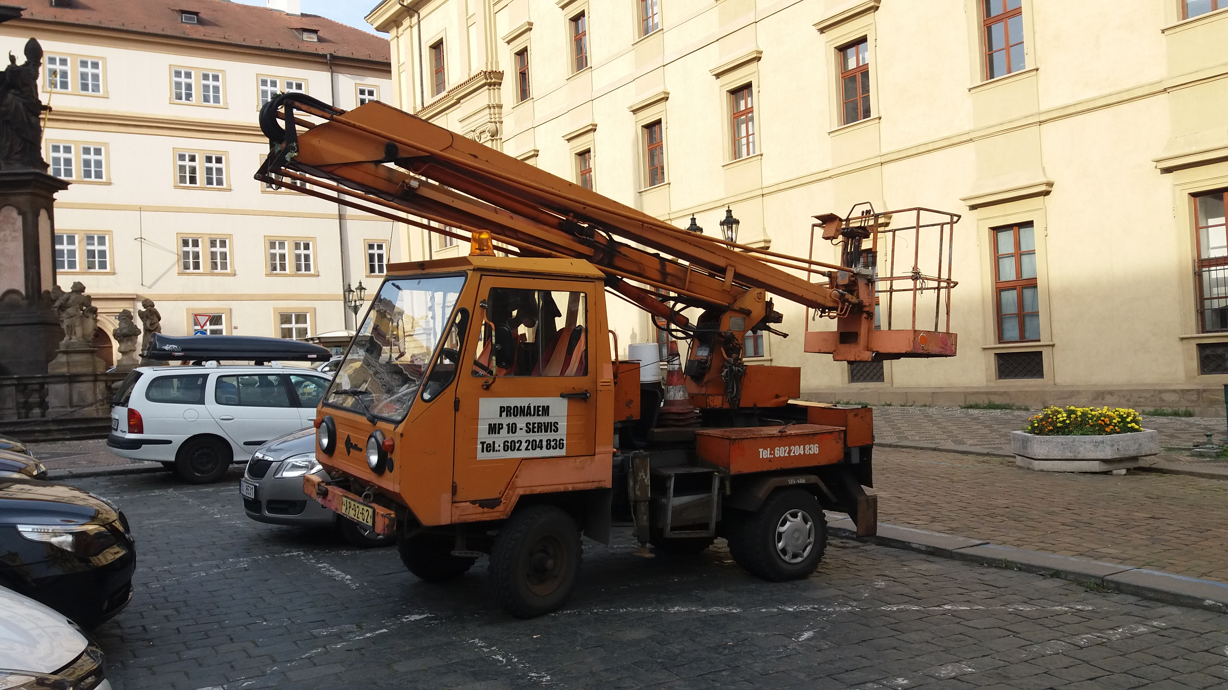 Automobil IFA Multicar M 25 parkující na pražském Malostranském náměstí.